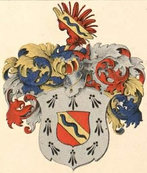 Breverni suguvõsa aadlivapp